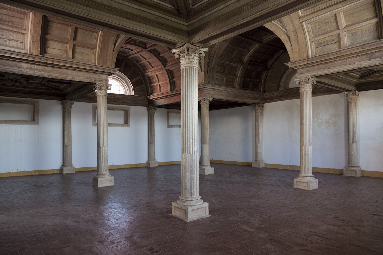 João de Castilho, Capela do Noviciado / Capela dos Reis Magoa, Convento de Cristo